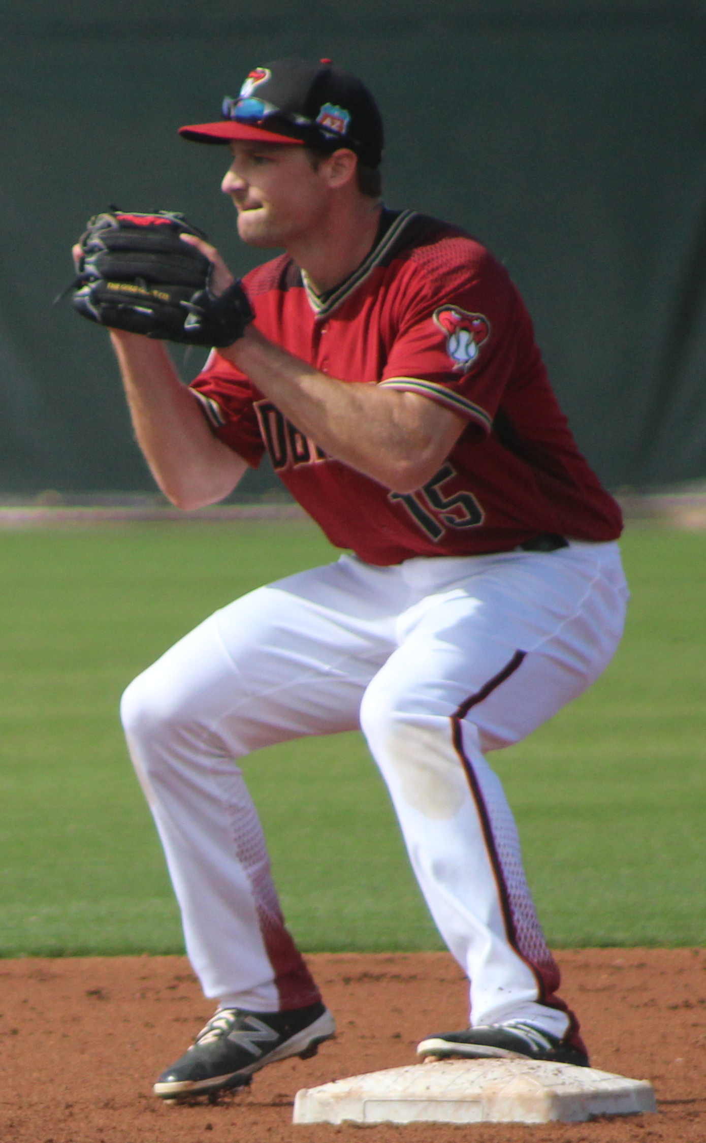 Philip Gosselin